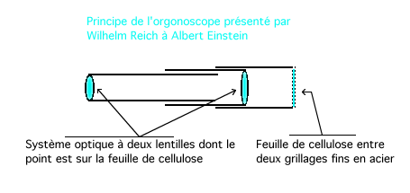 Orgonoscope Reich